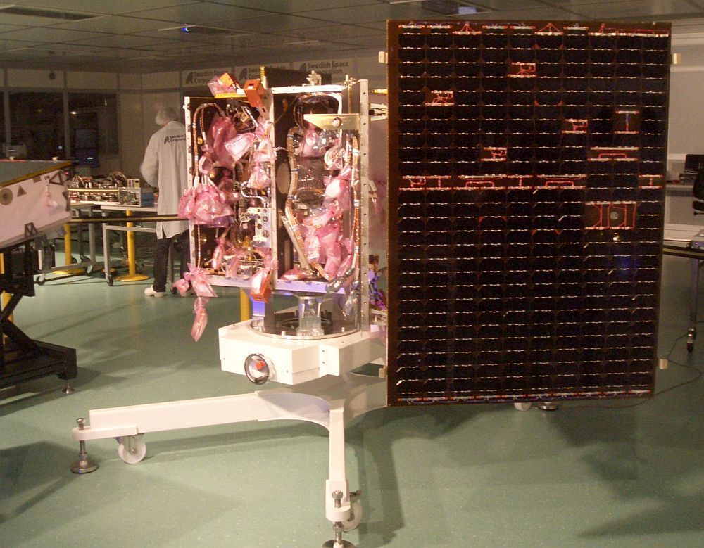 Prisma Satellit (Mitte Mango, links Tango) während der Integration Unknown